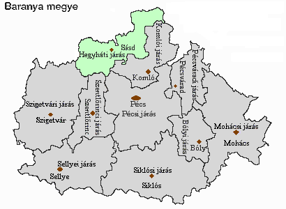 Magyarország, Baranya megye, Hegyháti járás